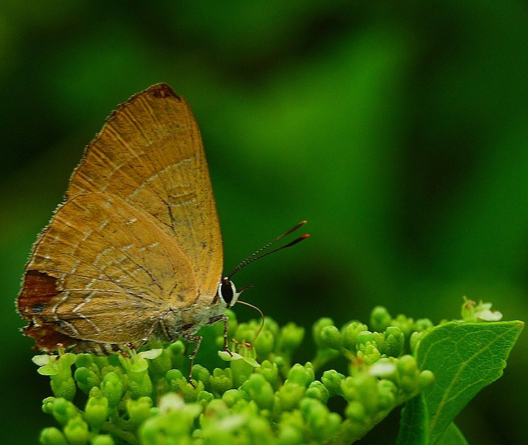 പശ്ചിമ ഘട്ട പ്രദേശങ്ങളിലും , ഹിമാലയൻ താഴ്വരകളിലും കാണപ്പെടുന്ന ചെറിയ ശലഭമാണ് കനിതുരപ്പൻ. Cornelian എന്നാണു ആംഗലേയ നാമം. Deudorix epijarbas എന്ന ശാസ്ത്രീയ നാമത്തിൽ അറിയപ്പെടുന്നു.